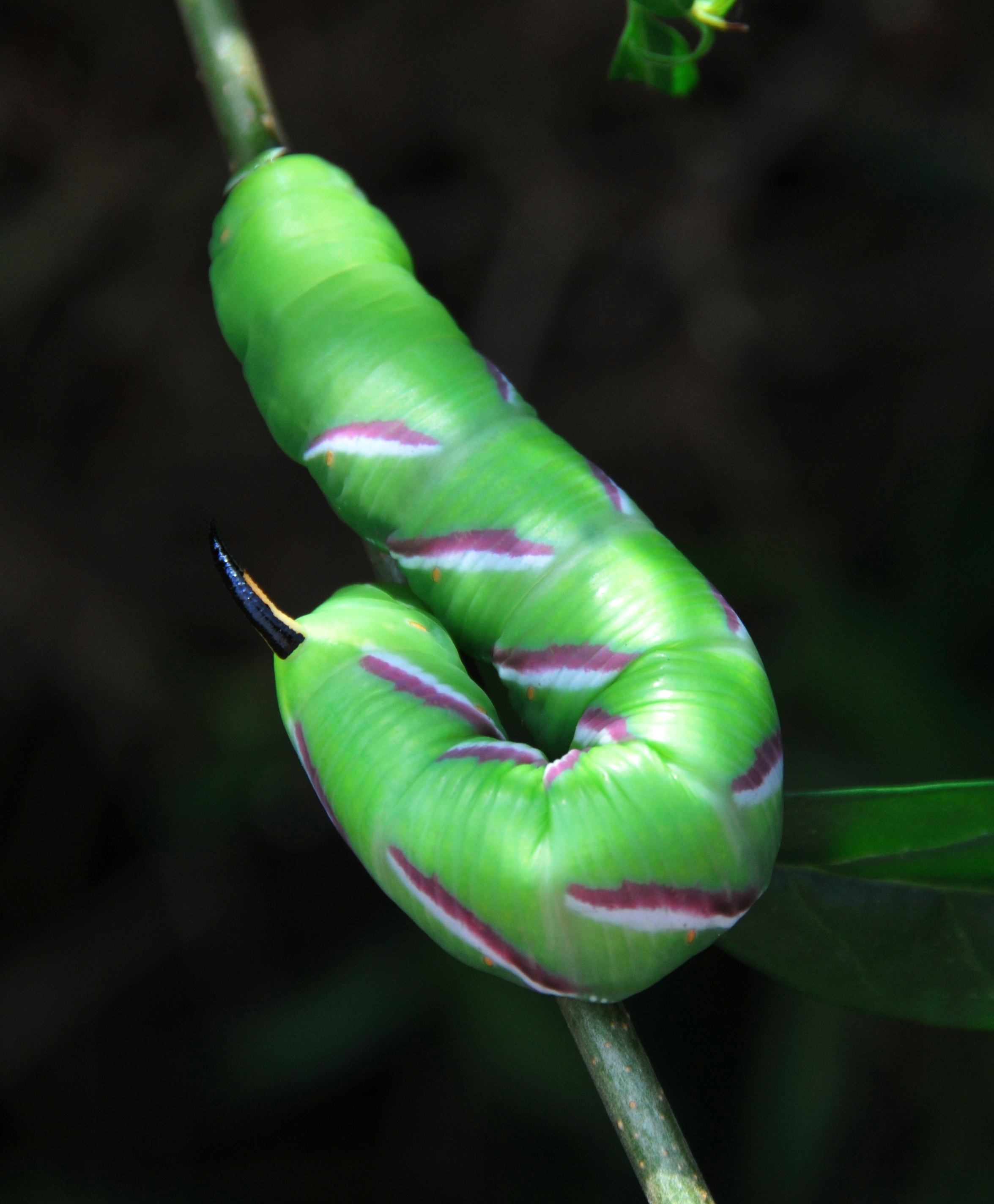 Ligusterschwärmer, Raupe